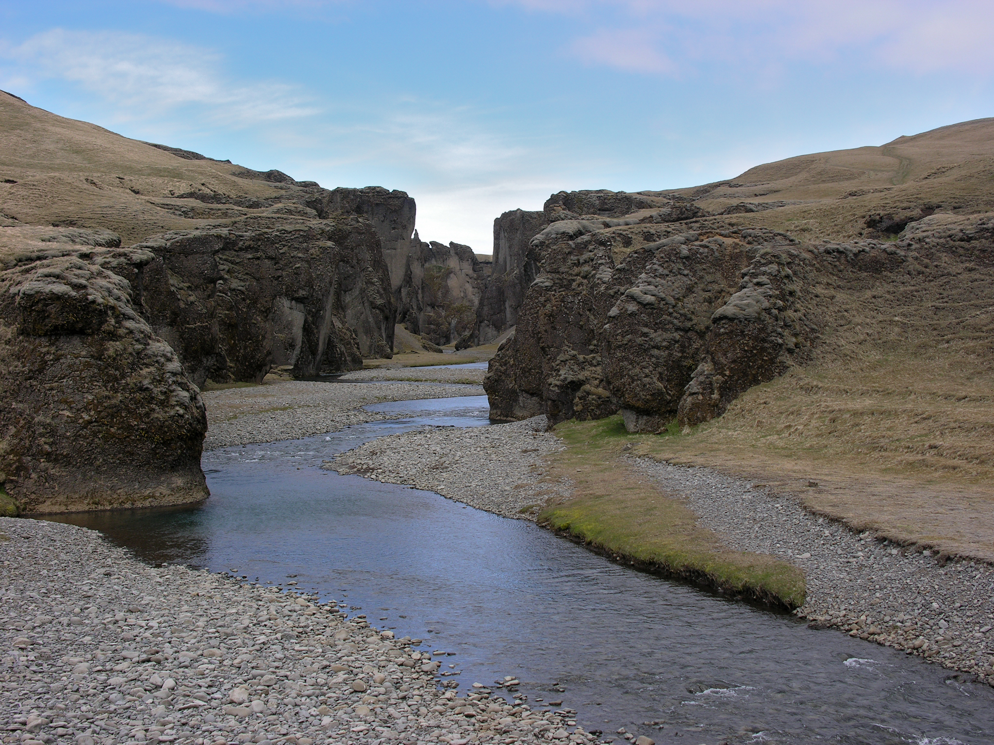 Iceland, Fjaðrárgljúfur near Kirkjubæjarklaustur